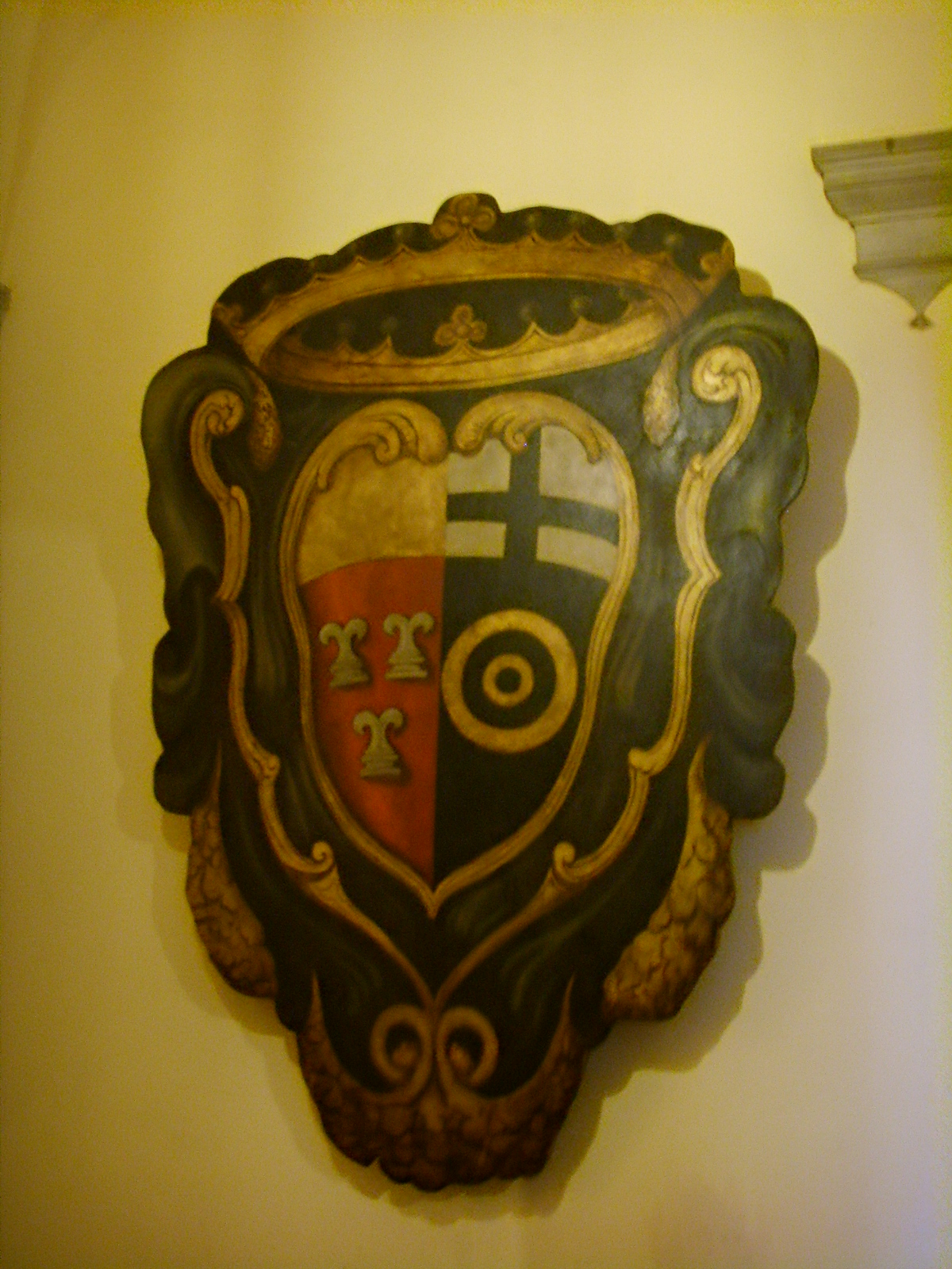 Palazzo dei frescobaldi, coat of arms